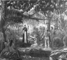 Obra da coleção Brasiliana Iconográfica.